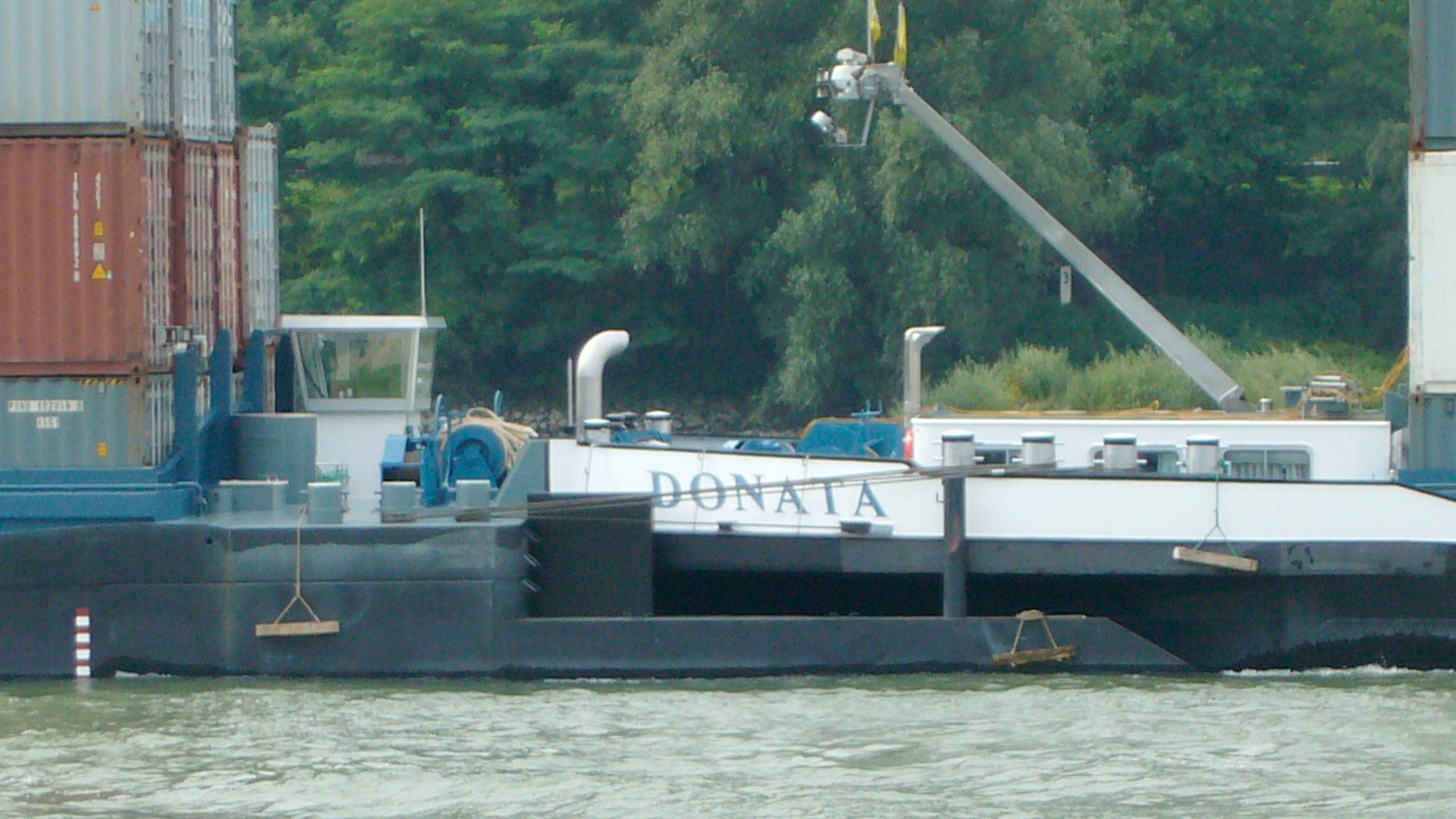 Strömugsoptimierte Verbindung Koppelverband